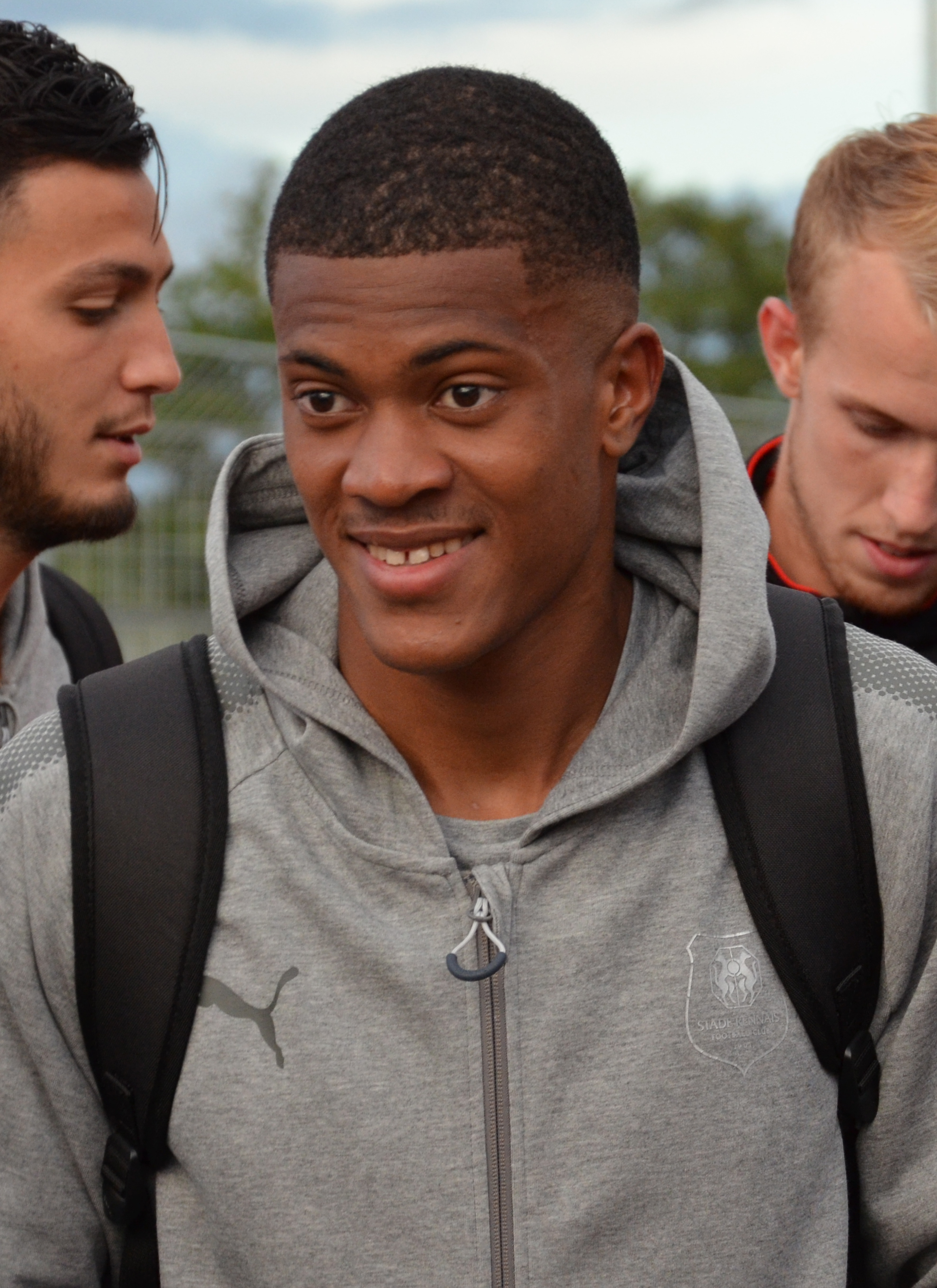 Photographie prise lors du match opposant le Stade rennais au SM Caen en match amical au stade Pierre-Compte de Vire le 22 juillet 2017. Ici, Jordan Tell.